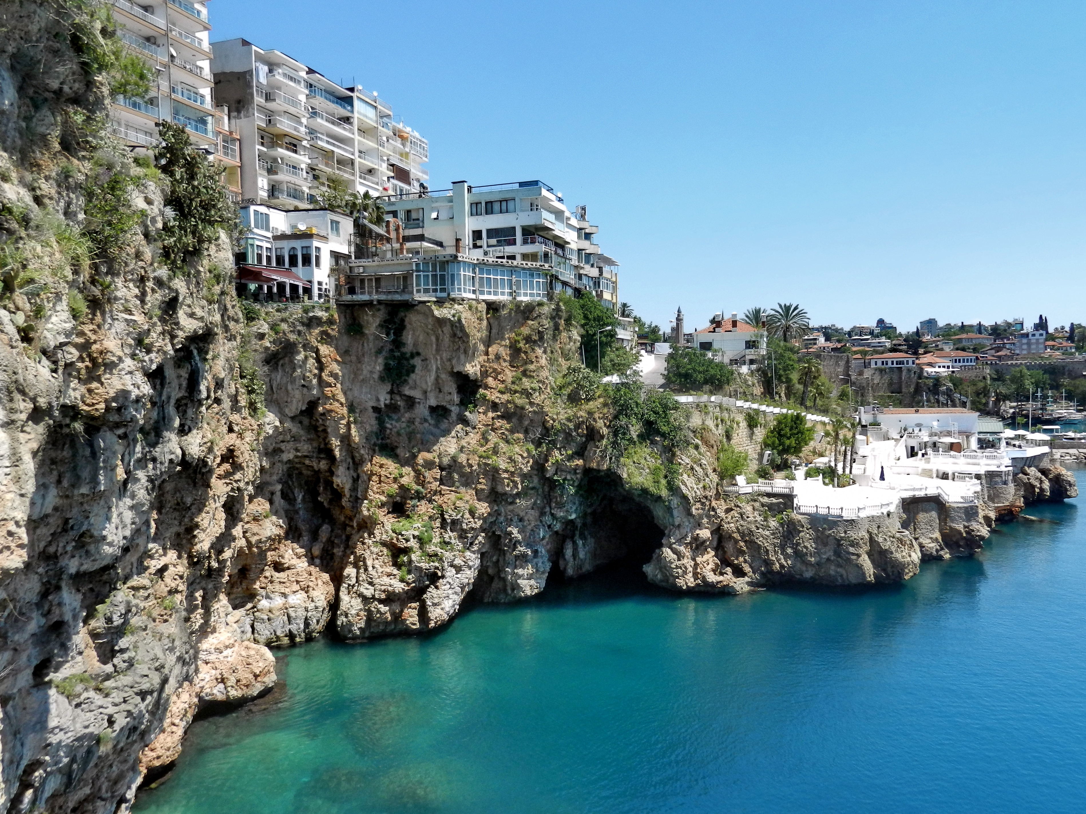 Antália